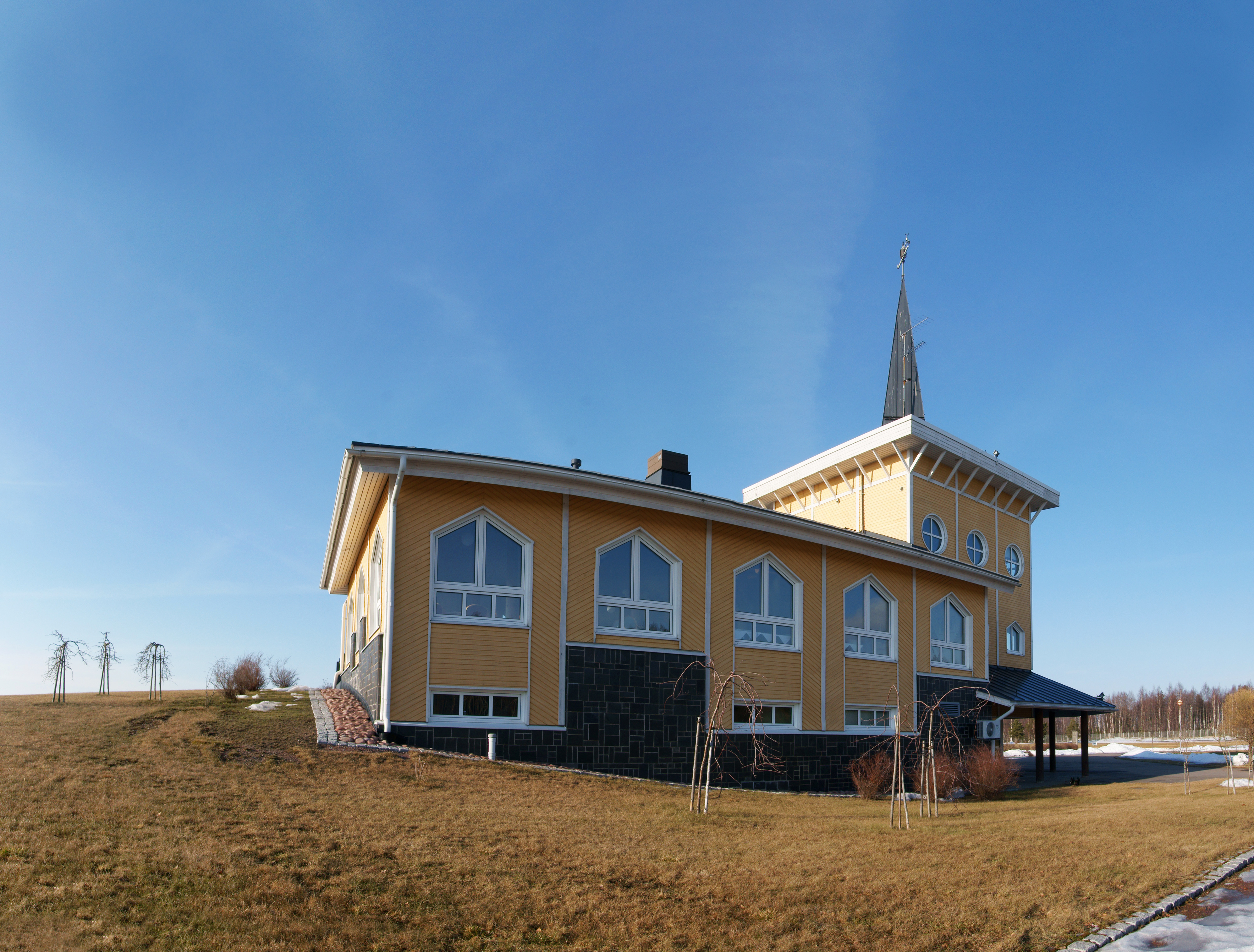 Yyterin Golfklubin klubitalo, ravintola 19.-reikä.